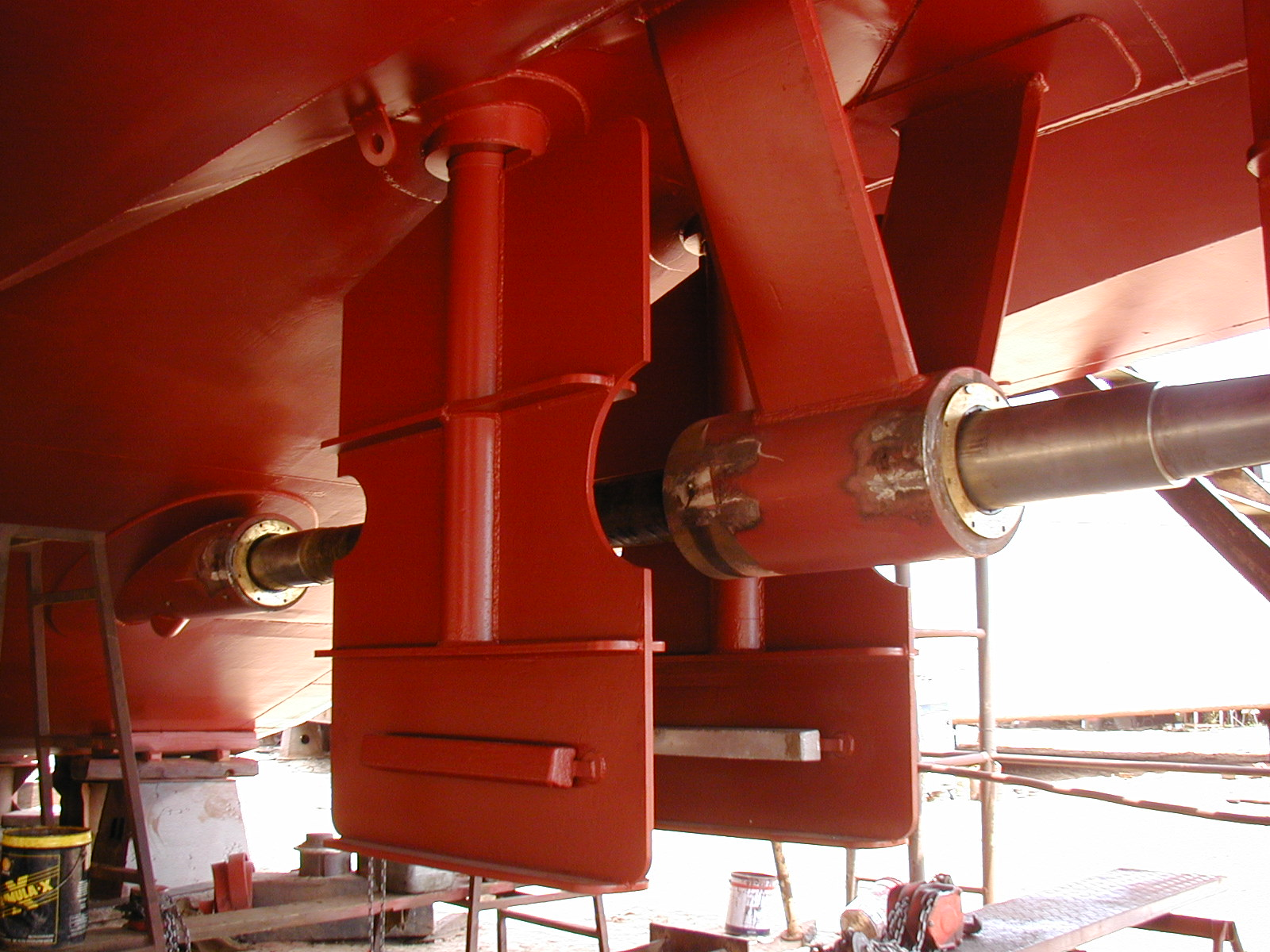 propeller end of shaft